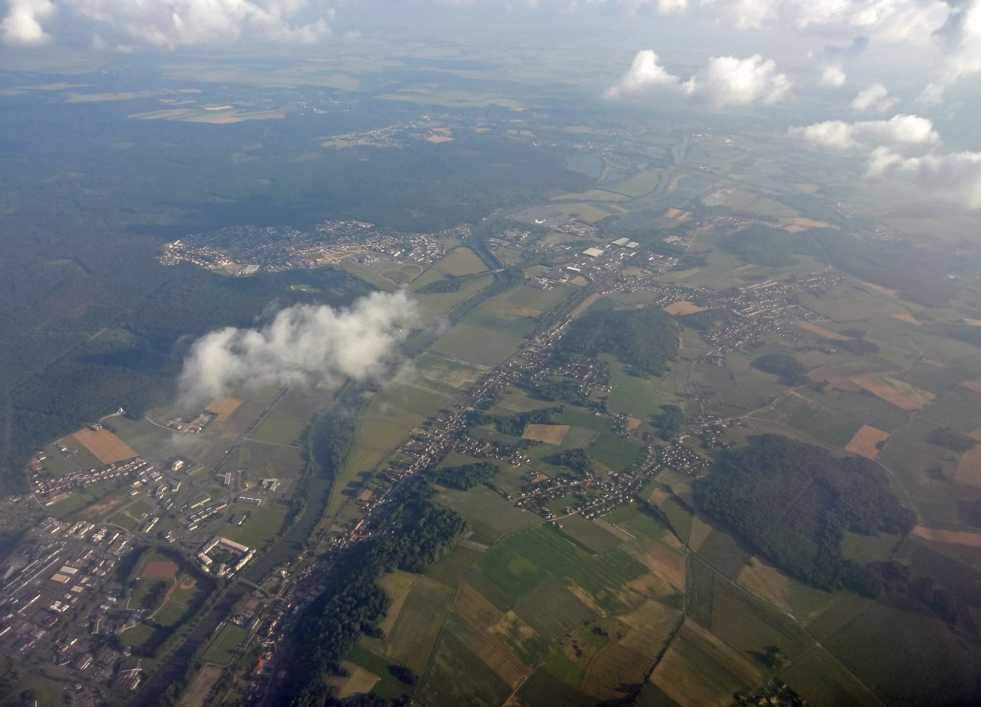 Vue aérienne de Jaux (Oise), France.